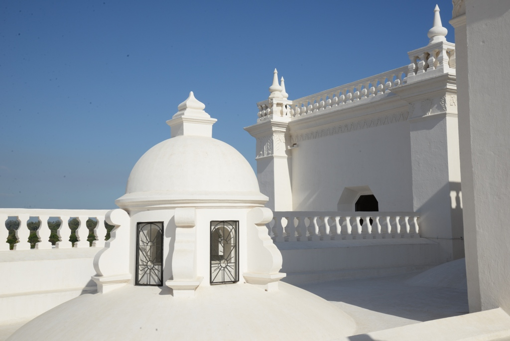 Catedral de León